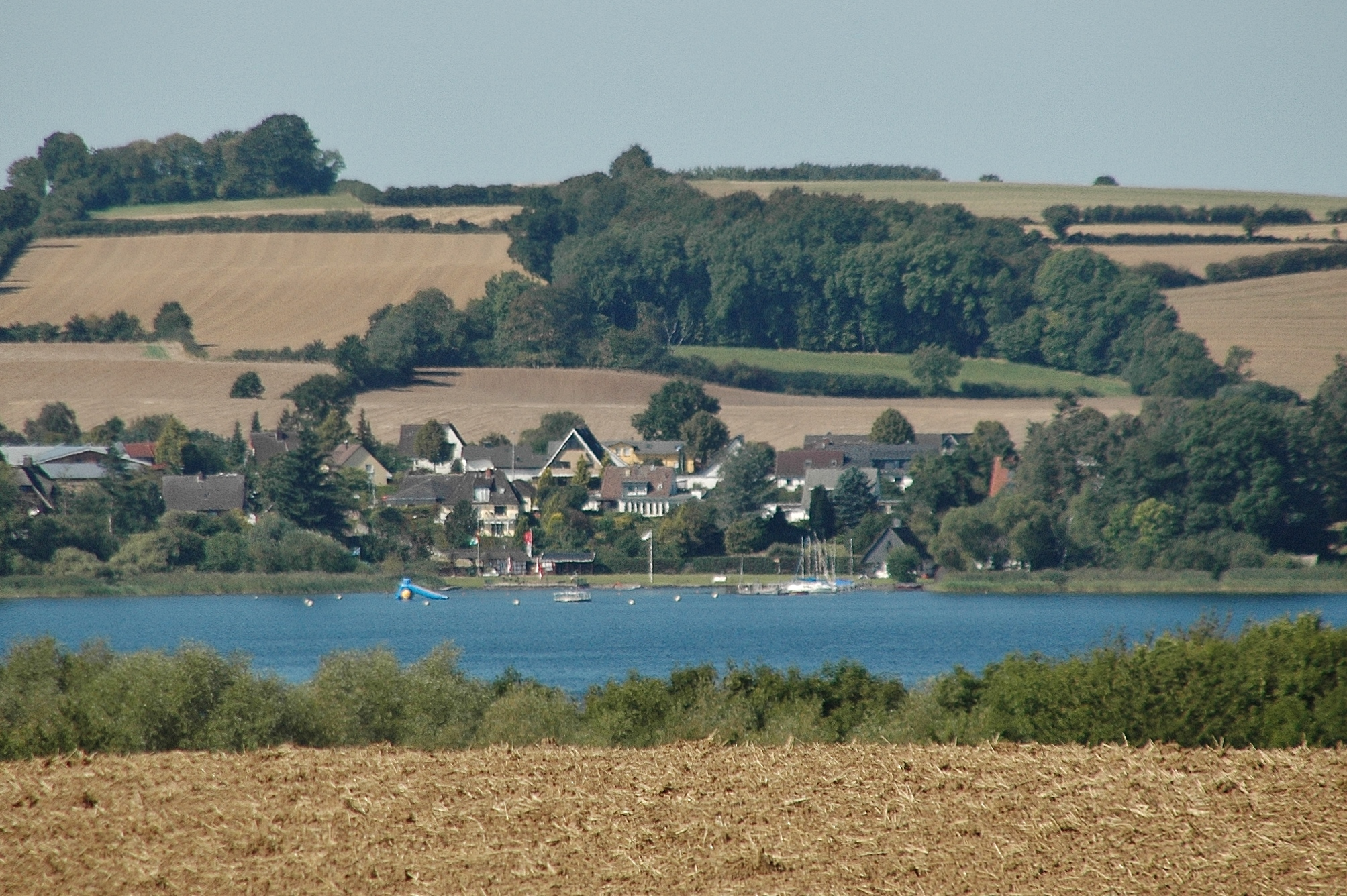 Blick über den Ratzeburger See